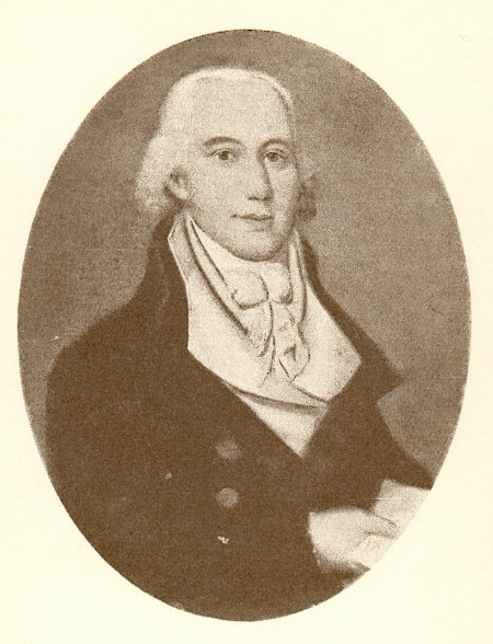 Peter de Svanenskiold (1764/65-1829), Danish landowner